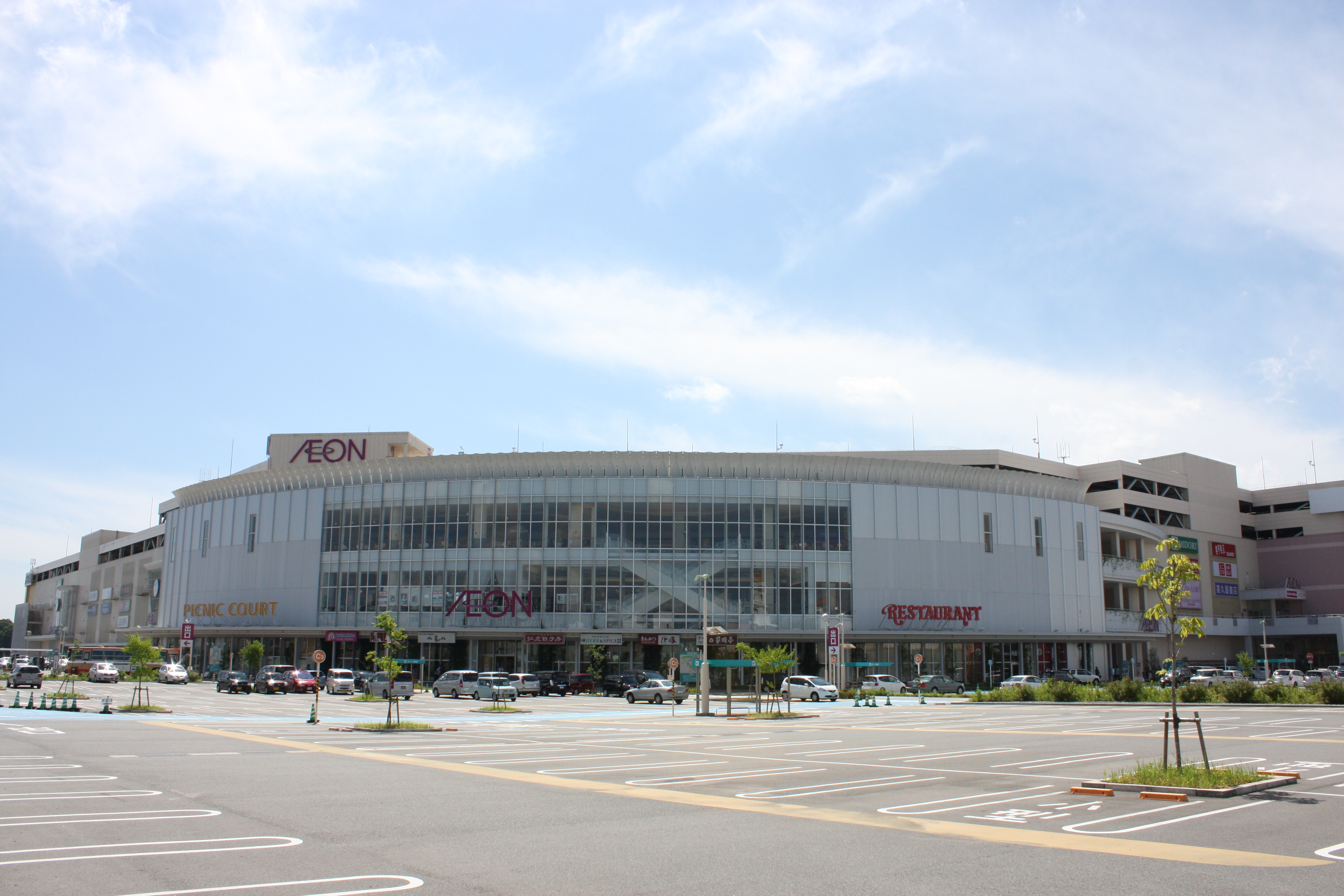 イオン北神戸ＳＣ